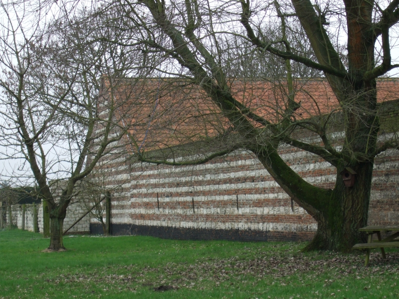 Rouges barres Lesquin hameau d'Eveltin